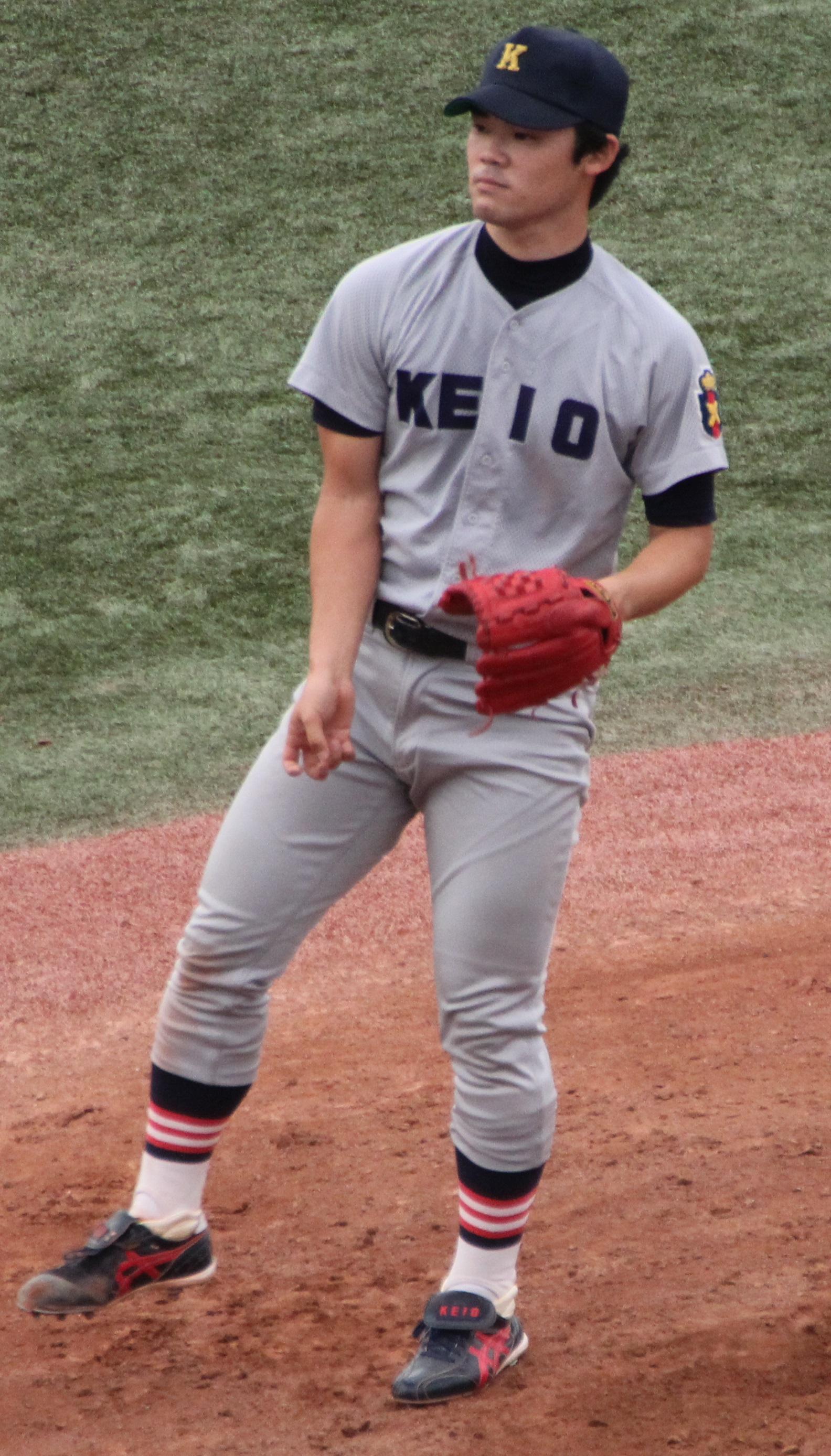 慶應義塾大学(慶應義塾体育会)野球部の福谷浩司投手。東京六大学野球2012年秋季リーグ、対明治大学第3回戦。明治神宮野球場にて。